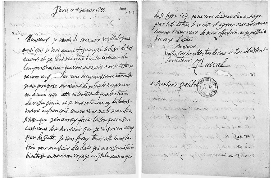 Une fausse lettre de Pascal à Galileo